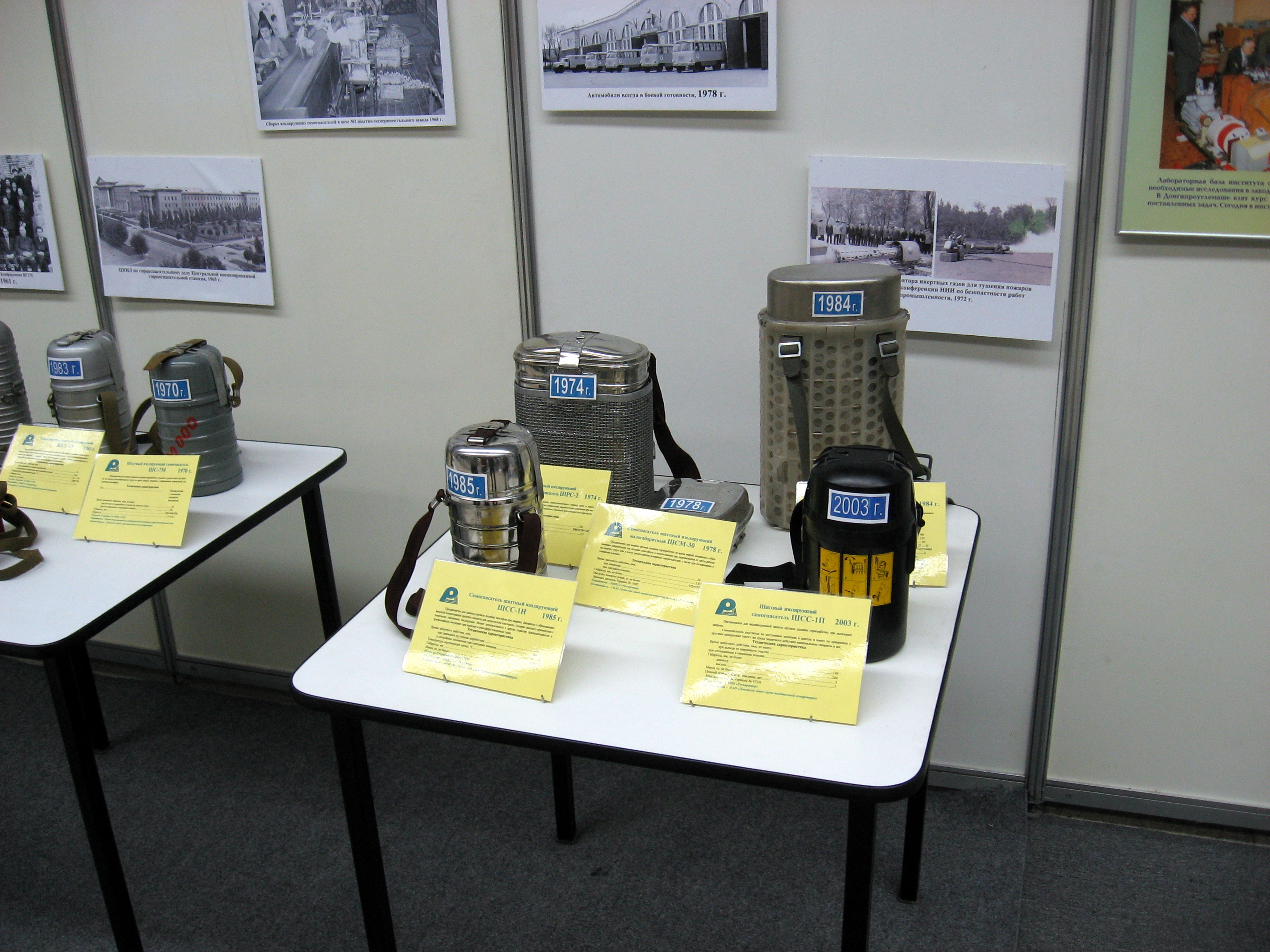 Фото з виставки Вугілля-Майнінг 2010